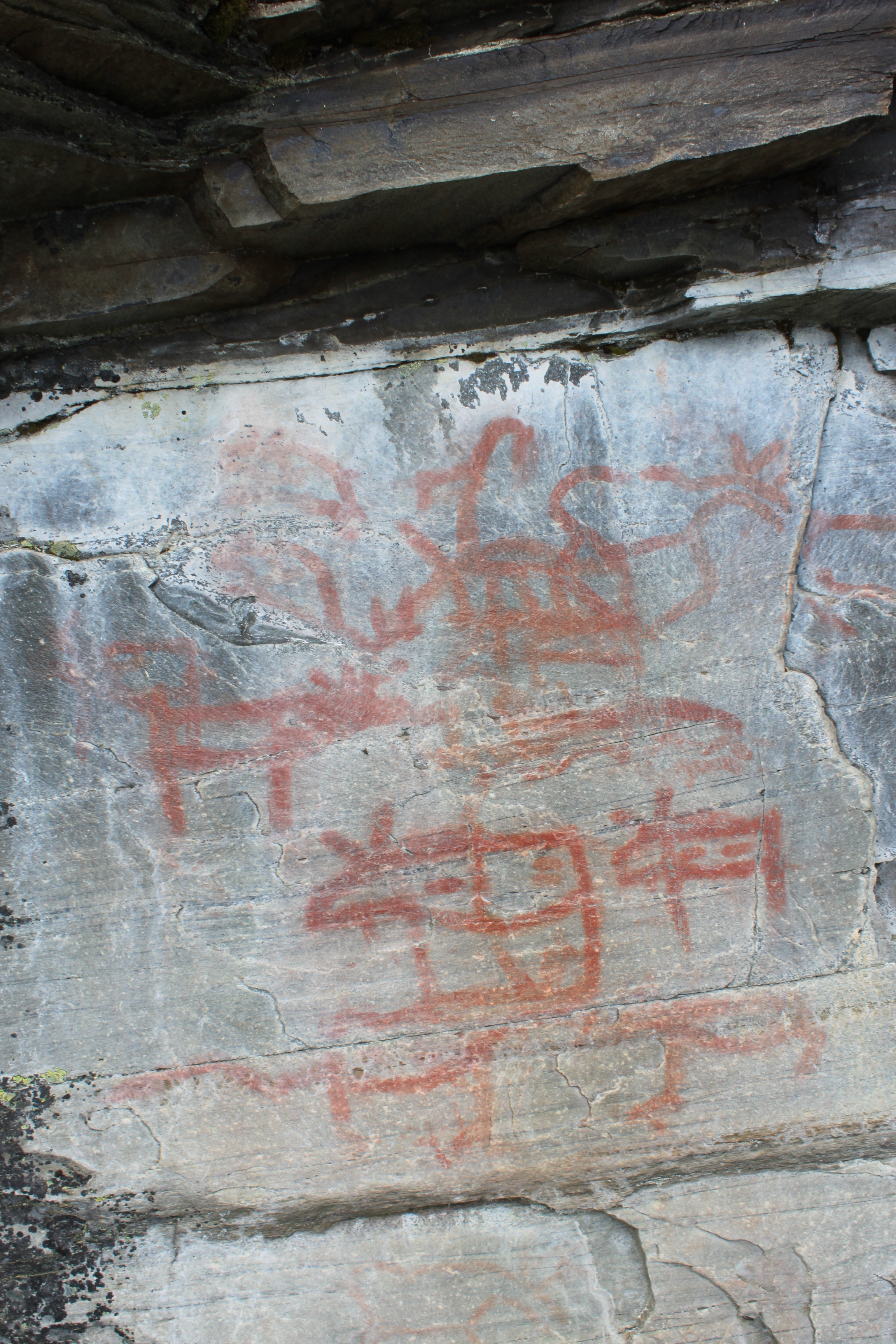 Hällmålning nära Ruvallen vid Messlingen (Tännäs 58:1) i Tännäs socken, Härjedalens kommun, Härjedalen, Jämtlands län, Sverige. Fast fornlämning.